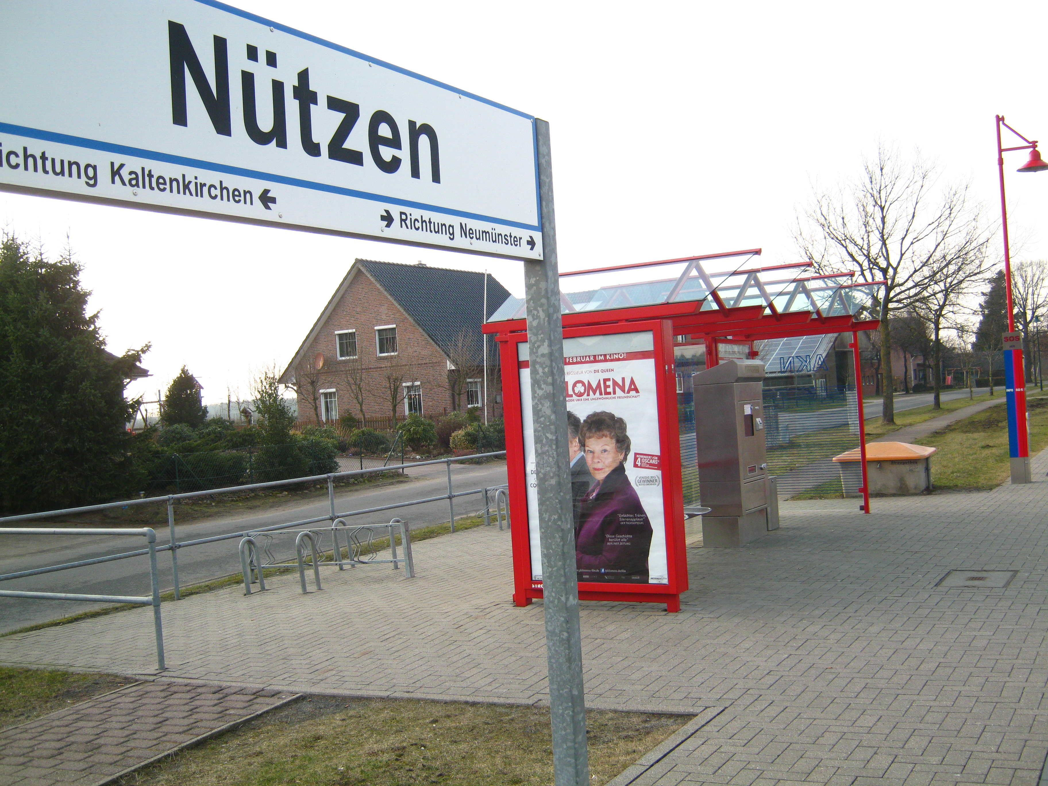 AKN Eisenbahn Station Nützen.